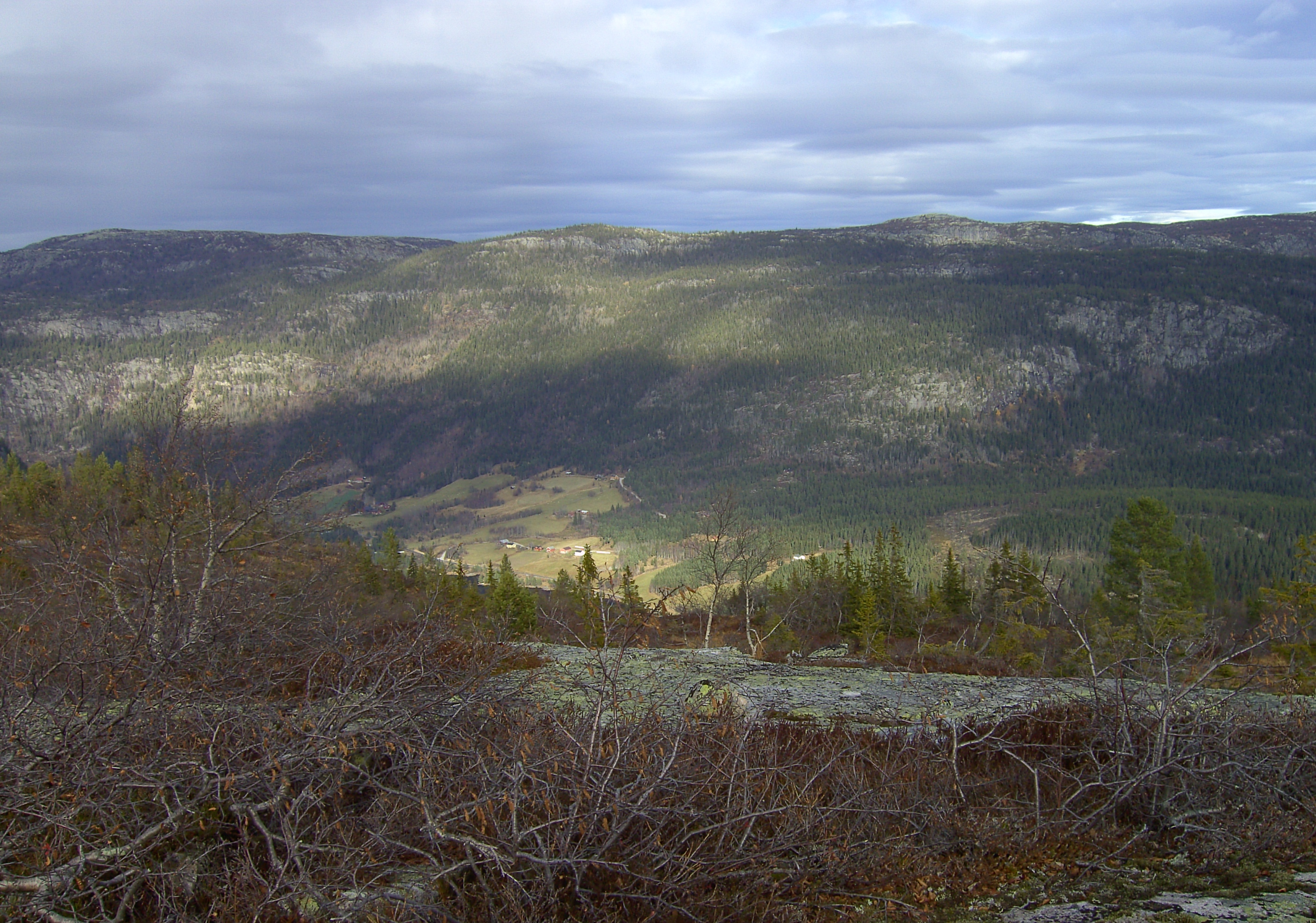 Kleivgrend i Fyresdal